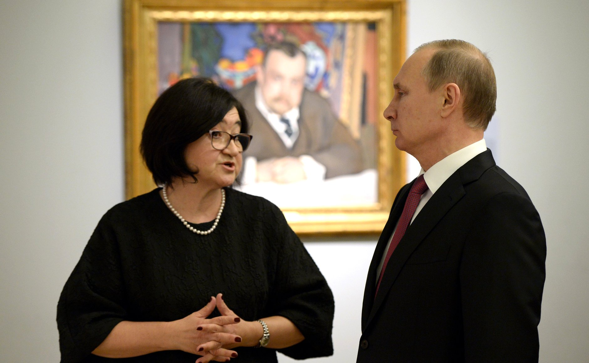 Посещение Президентом России Владимиром Путиным выставки «Валентин Серов. К 150-летию со дня рождения» в Третьяковской галерее на Крымском Валу в Москве